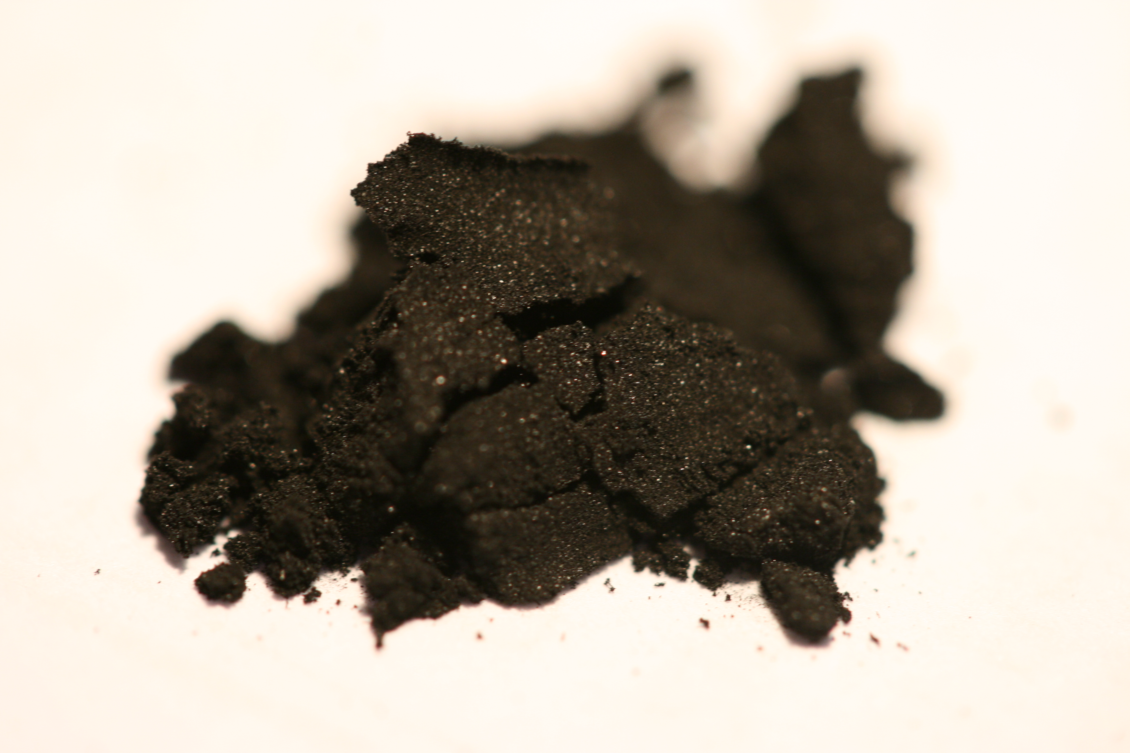 Reißkohlepulver